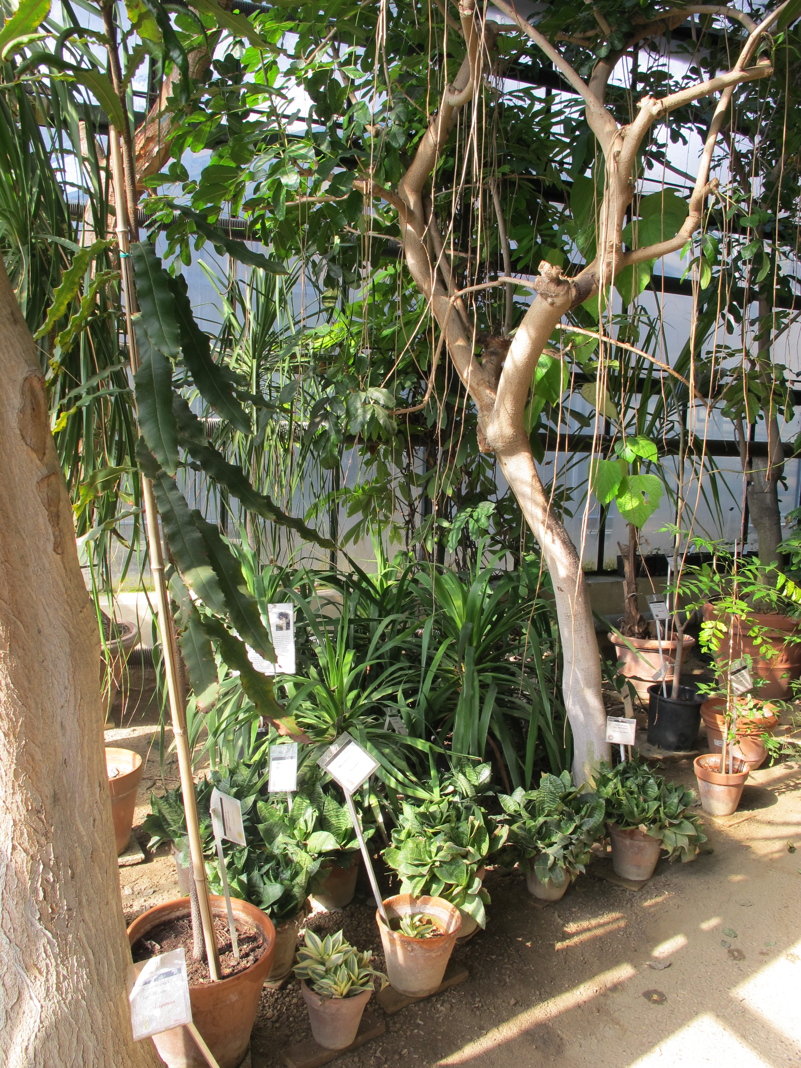 Istituto agronomico per l'oltremare, serre